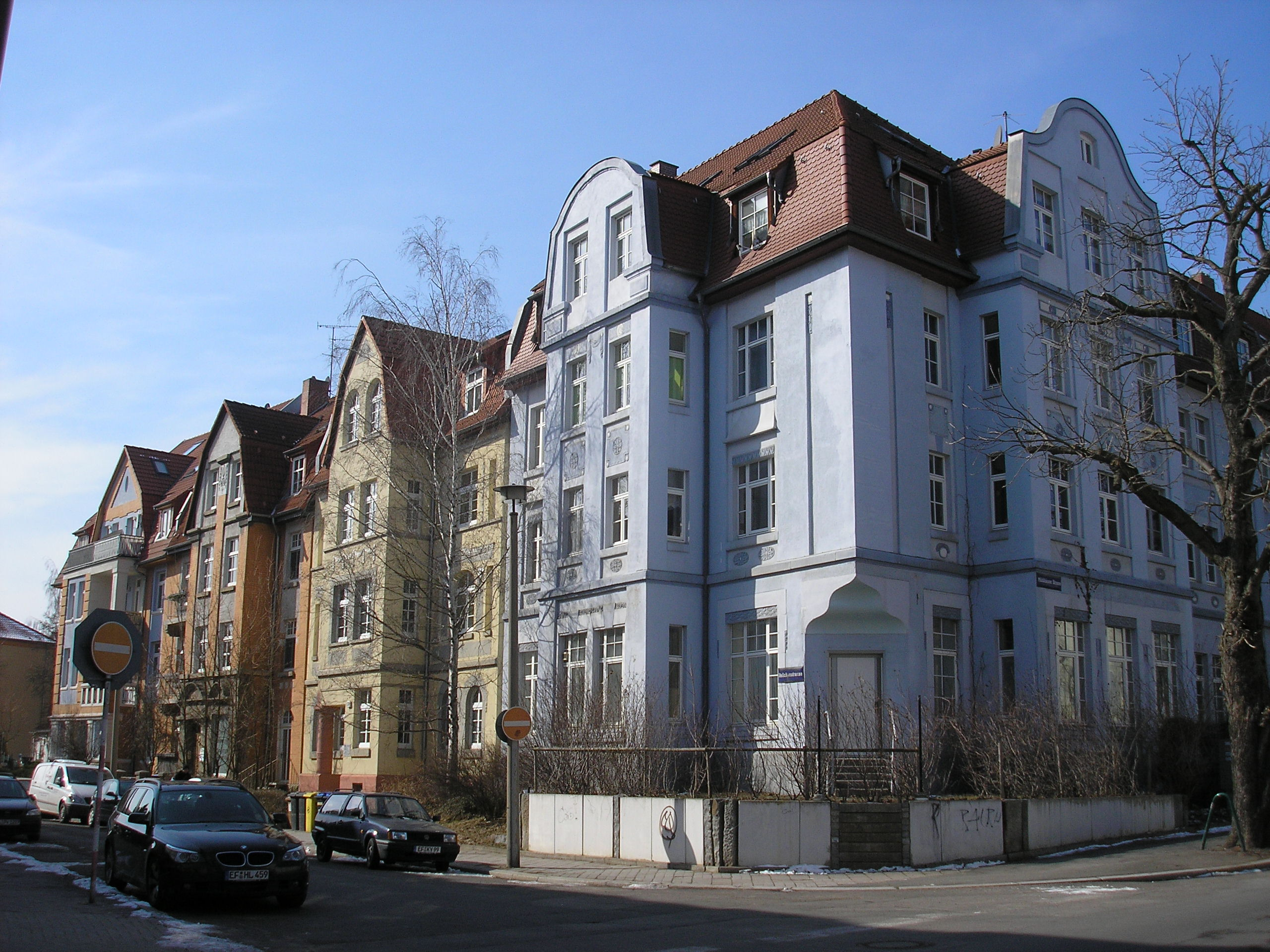 Häuser an der Veilchenstraße in Erfurt.